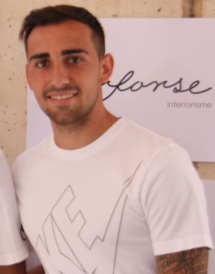 Vicent Guaita, Pedro López i Francesc Alcácer, al seu poble.